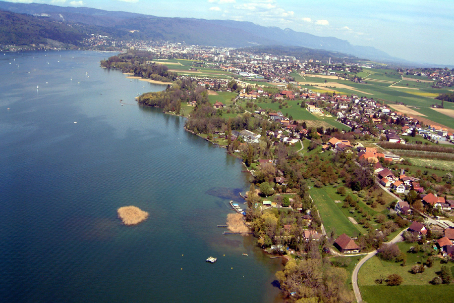 Flugaufnahme Sutz-Lattrigen